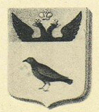 Герб Волошского гусарского полка (с 1776 по 1783 г.). Из книги: Висковатов В.В. «Историческое описание одежды и вооружения Российских войск с древнейших времён». Часть 13 — 1841–1862 гг. Описание герба: «вверху Государственный герб на золотом фоне; низ серебряный, чёрный ворон» (по В. Звегинцову).